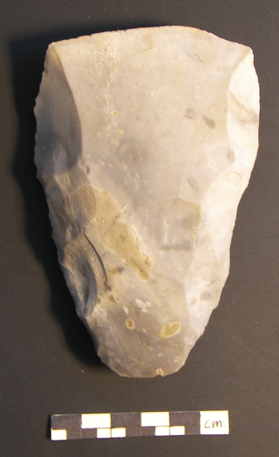 Reproduktion av en Skivyxa, typisk för Fosnakulturen tillverkad av Morten Kutschera, Norge 2006